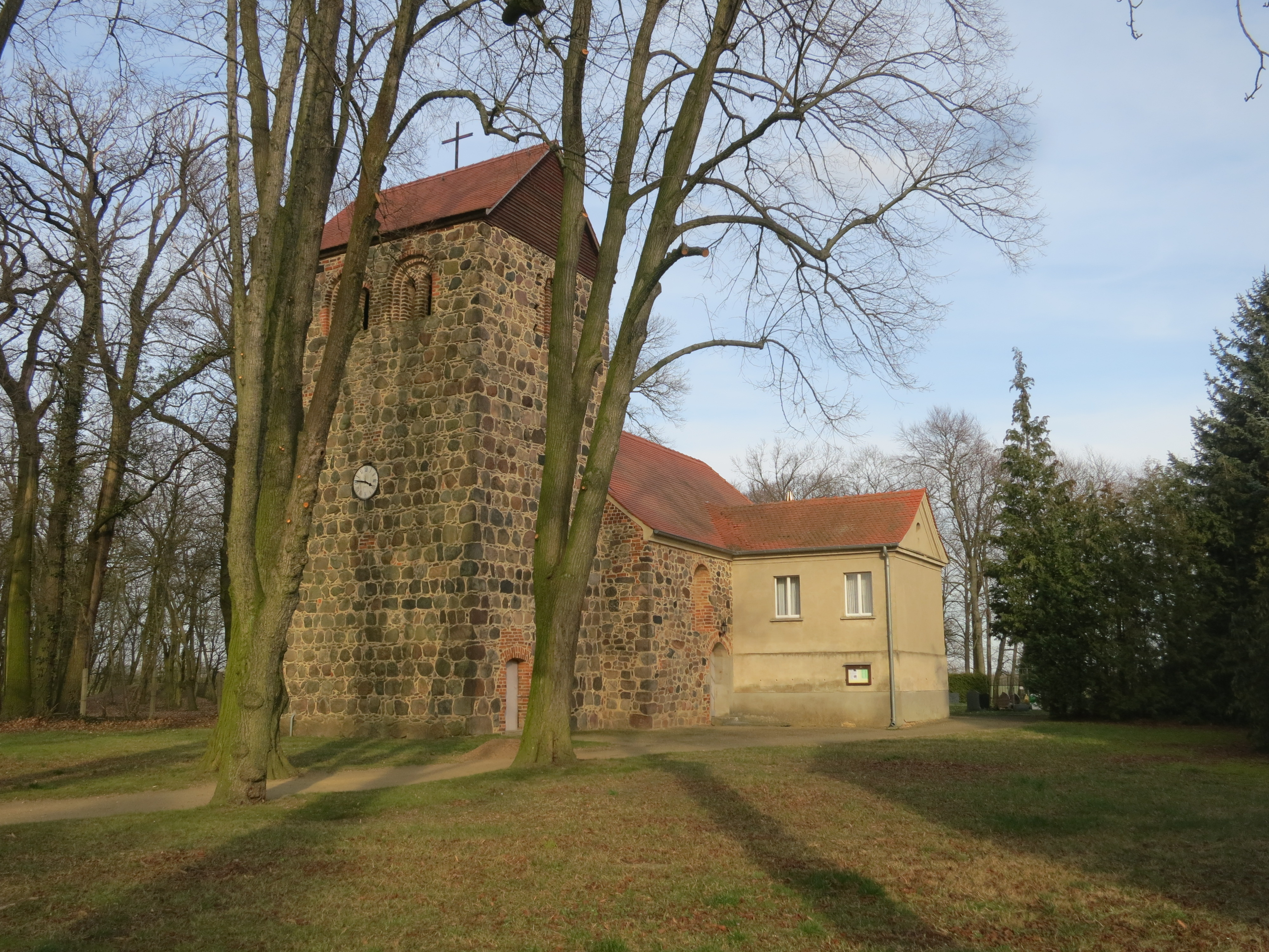 Gräfendorf, Gemeinde Niederer Fläming, Dorfkirche, Blick von Südwesten